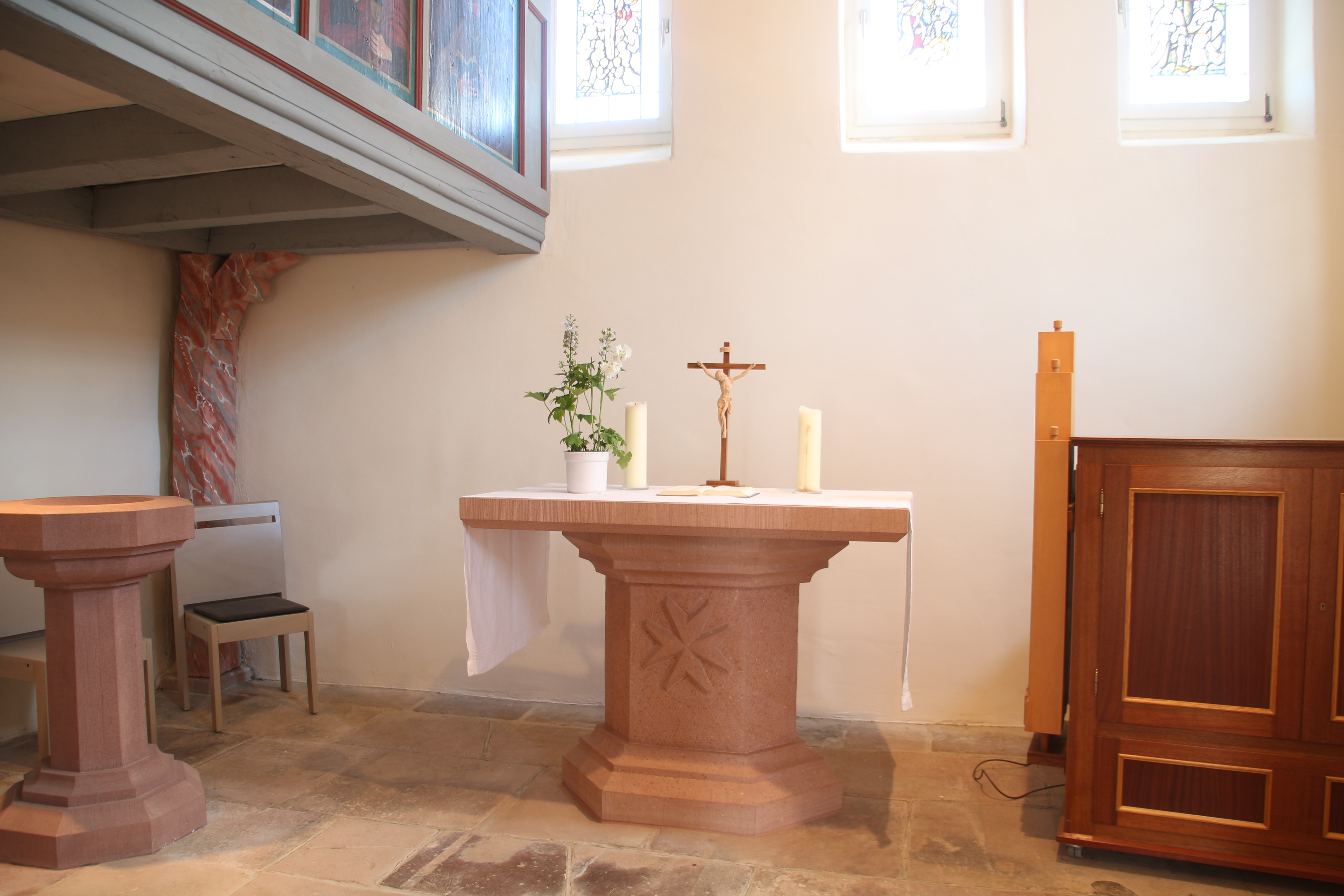 Evangelische Kirche Unter-Lais, Gemeinde Nidda, Wetteraukreis, Hessen